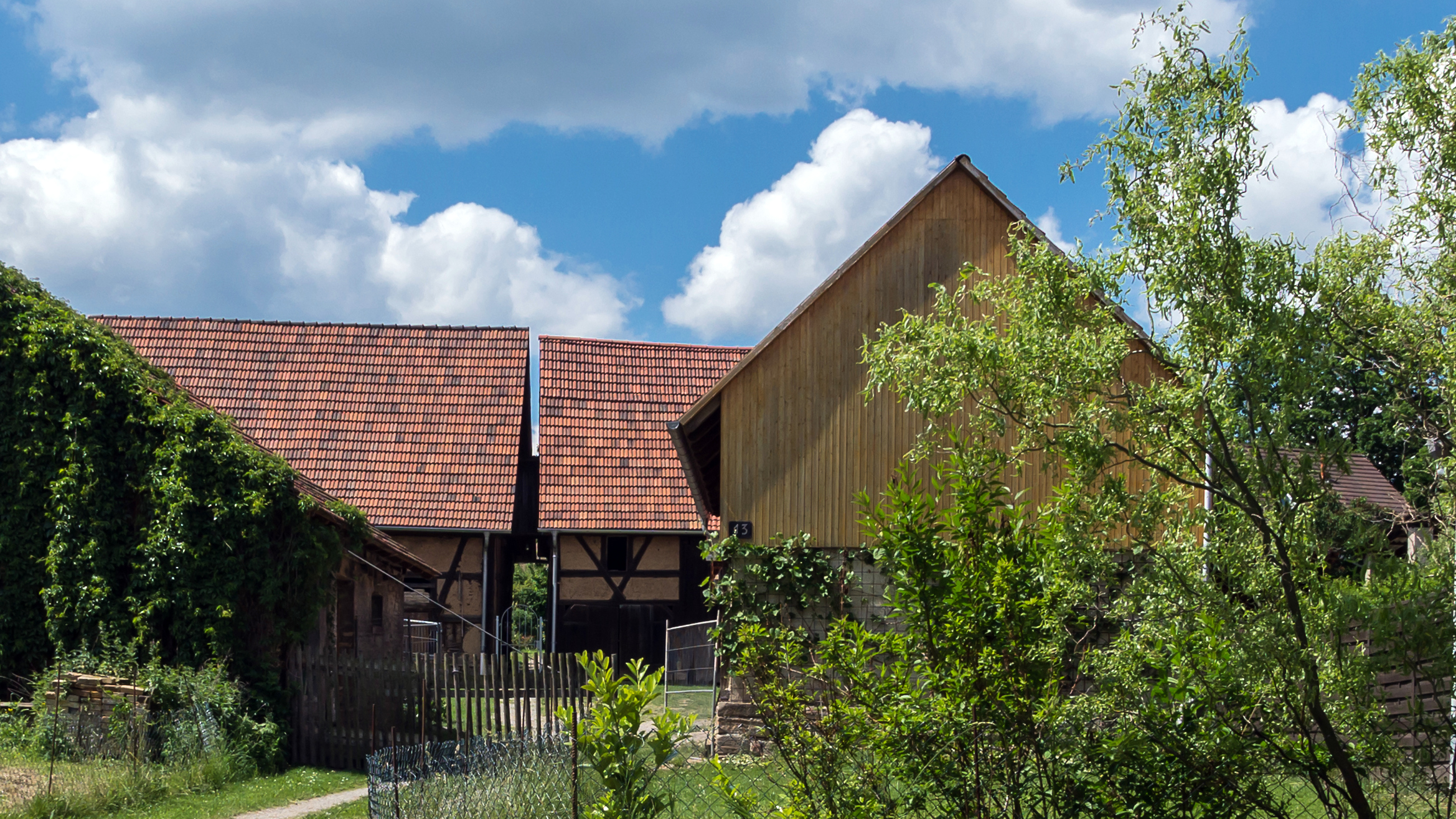 Denkmalgeschütztes Gehöft in Kolkwitz 13,Uhlstädt-Kirchhasel